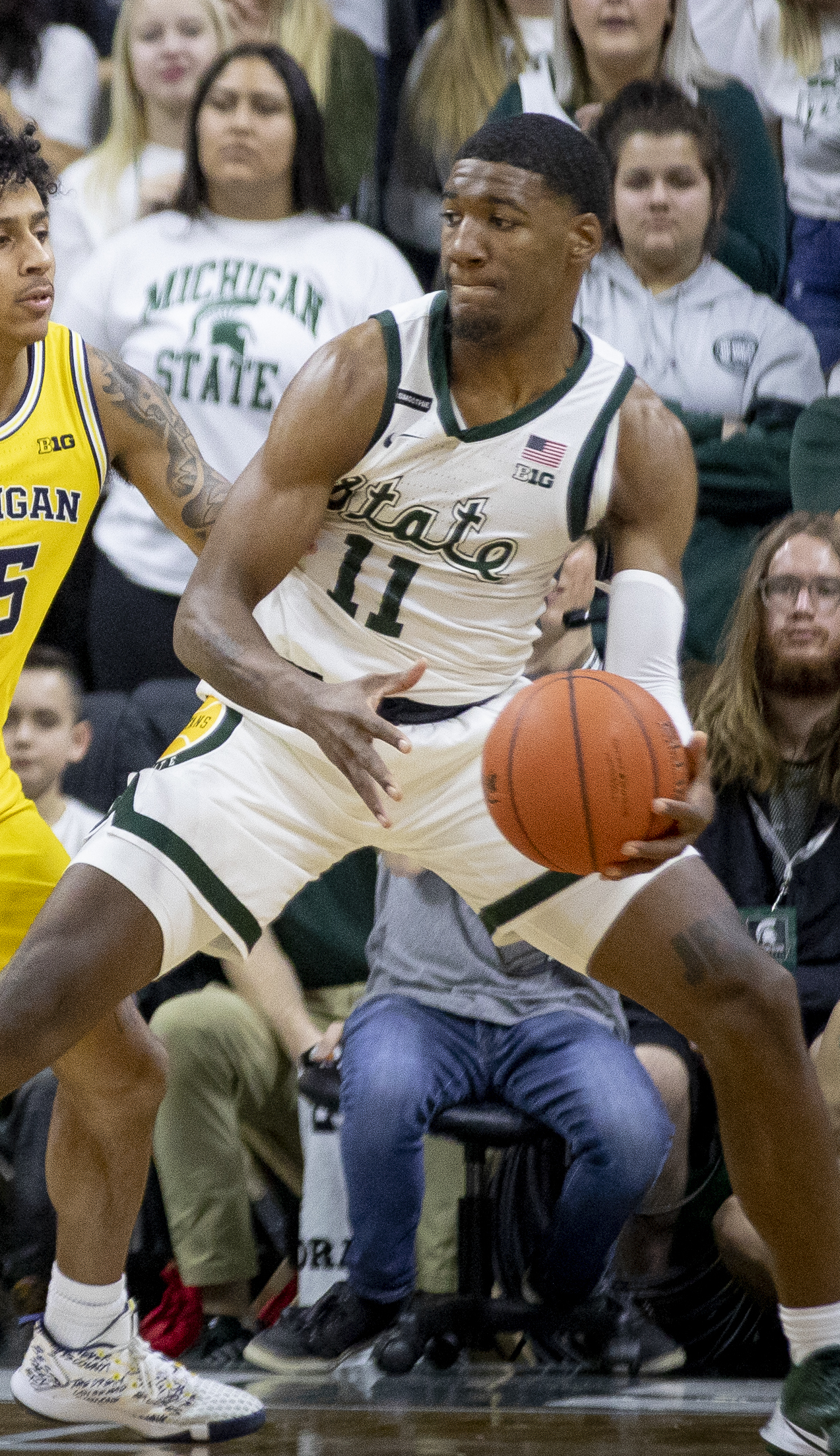 _O6A7654